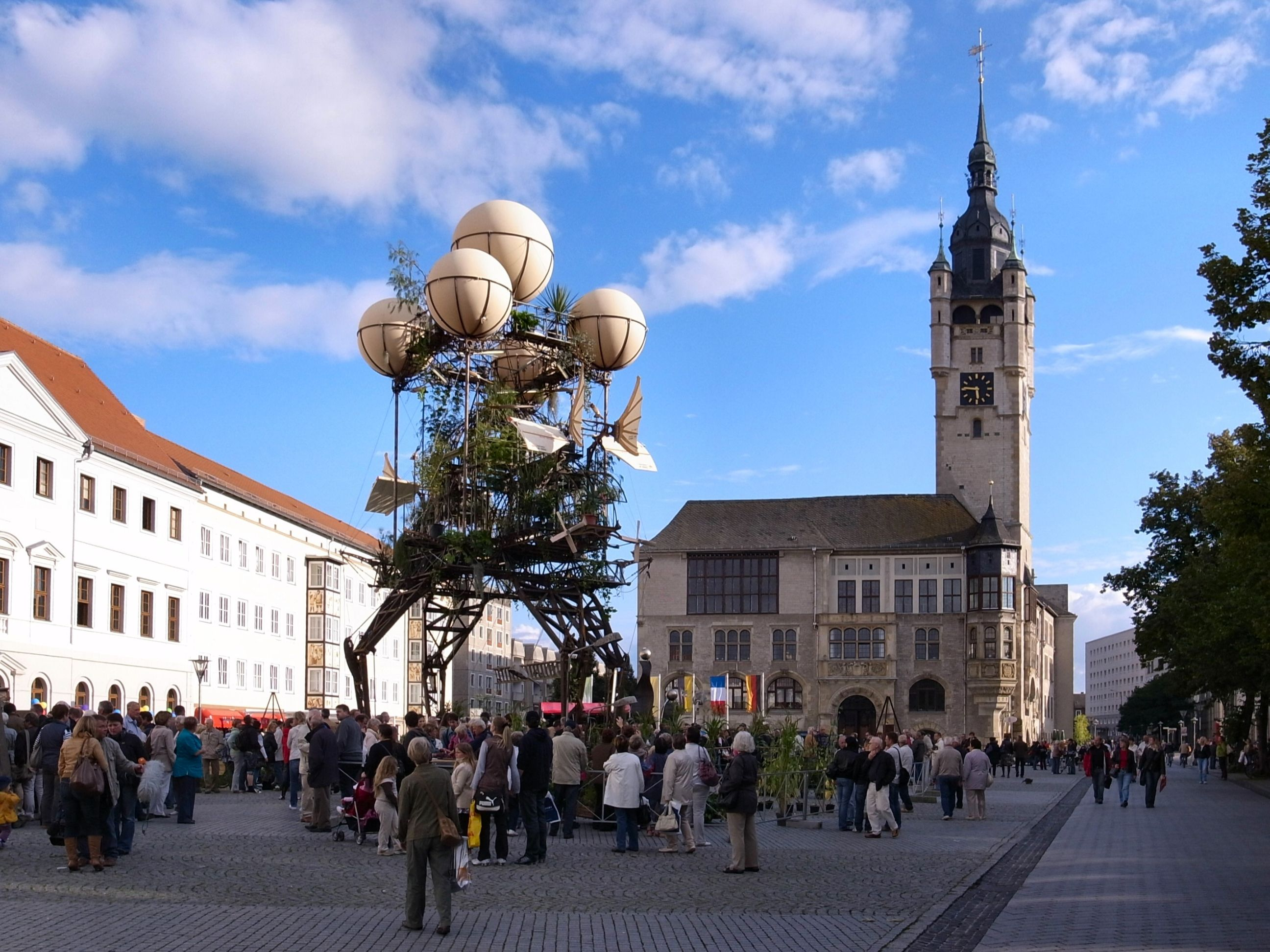 Dessau,Farbfest Grün,Landung der Aeroflorale II auf dem Marktplatz